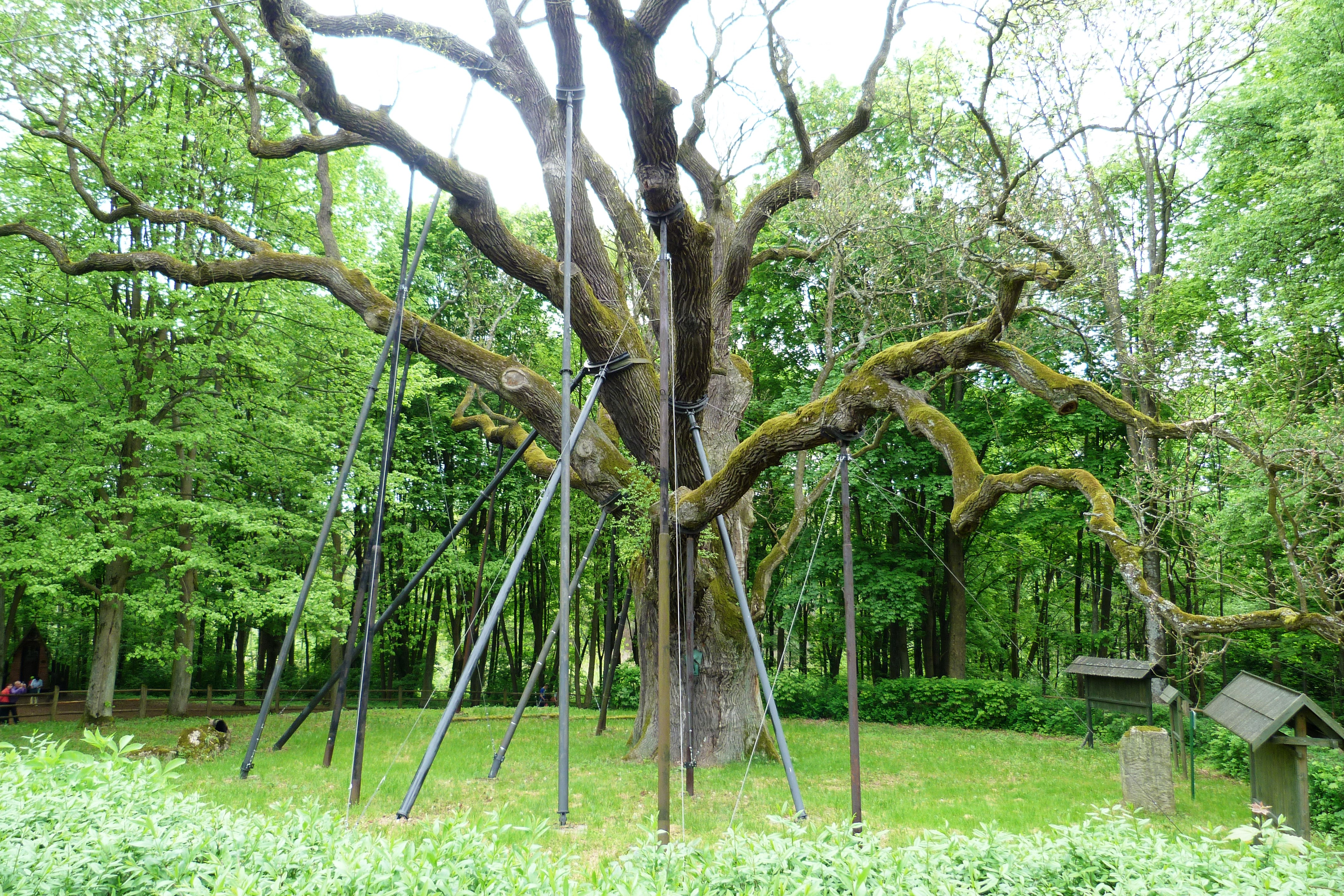 Pomnik przyrody: Bartek This is a photography of protected area with CRFOP ID PL.ZIPOP.1393.PP.2604192.1